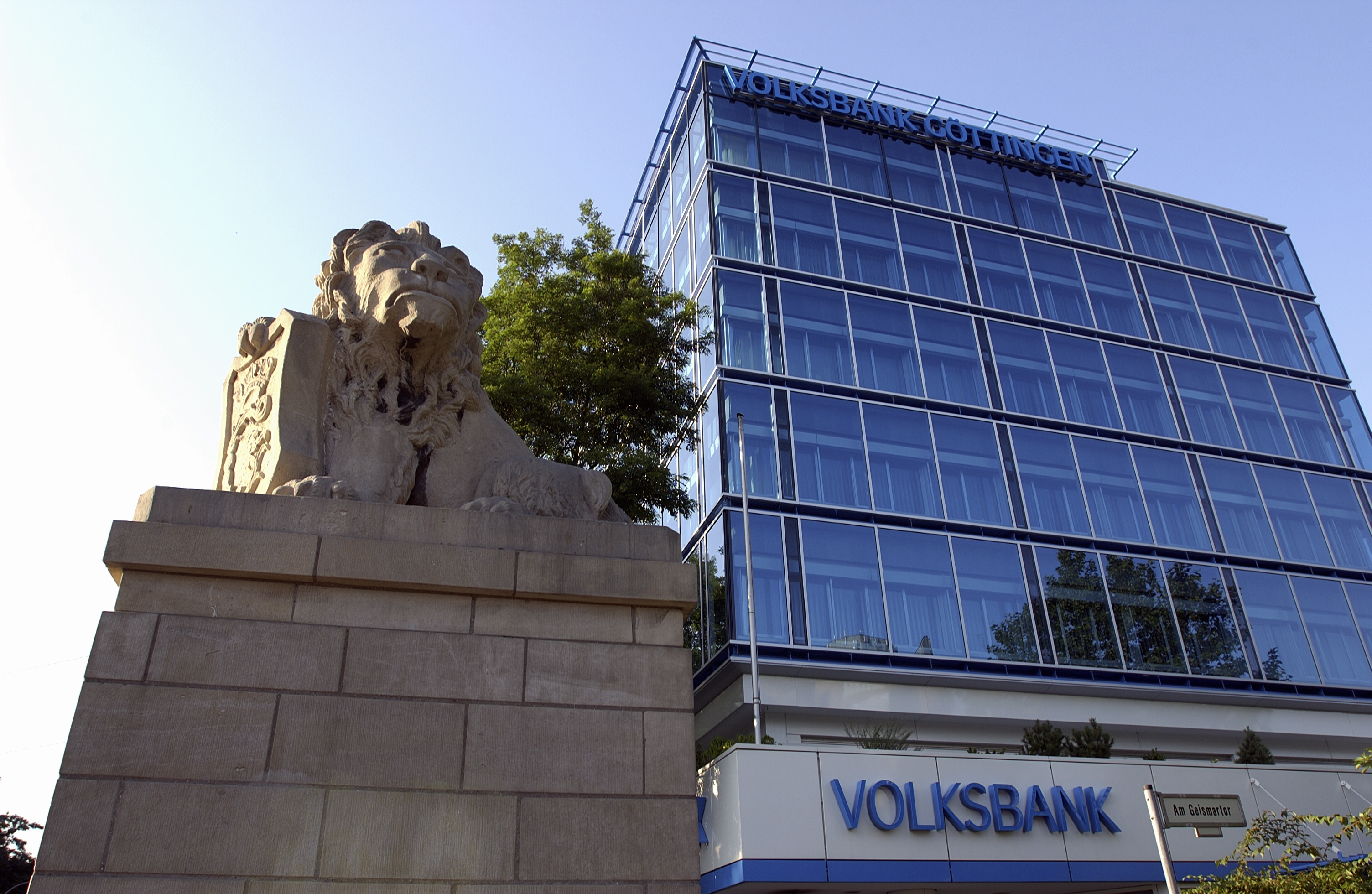 Goettingen, Geismar Tor